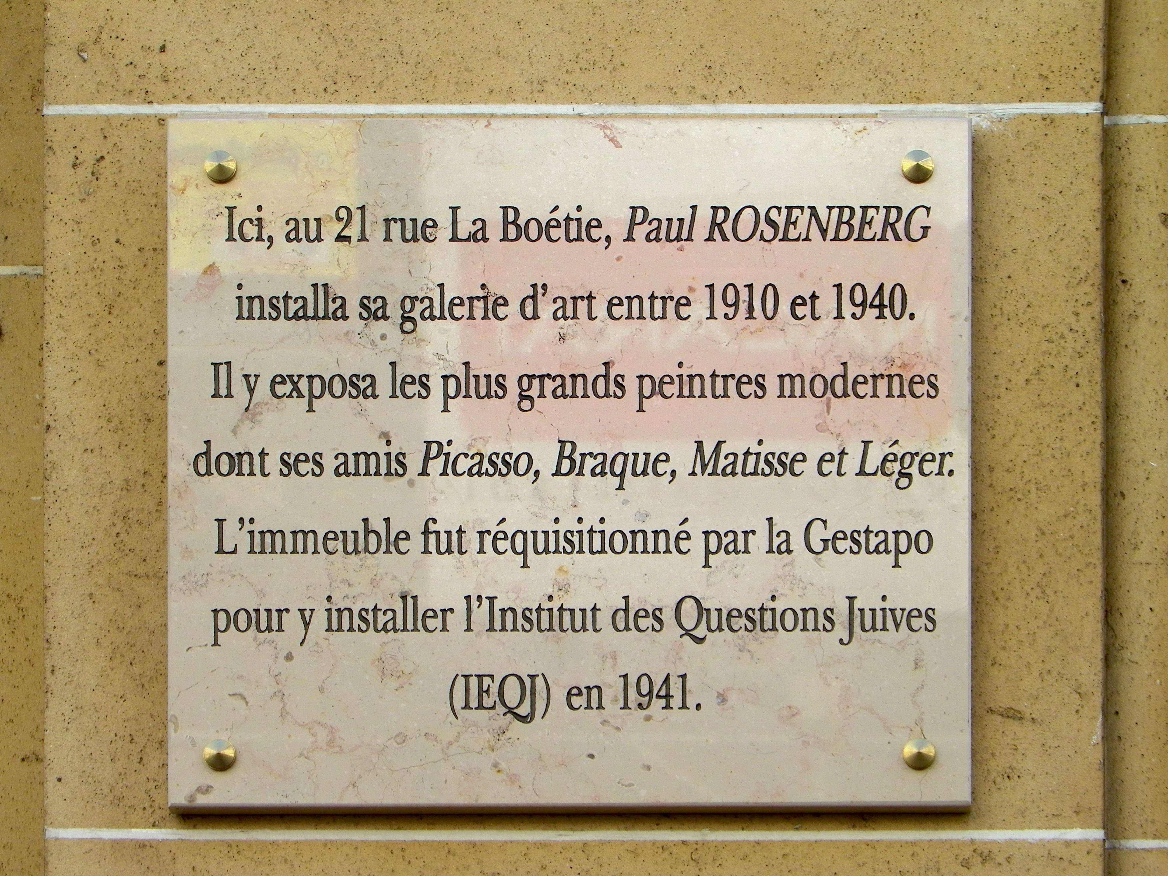 Plaque Paul Rosenberg au 21 rue La Boétie à Paris